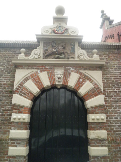 St. Jorispoort samen met verder op rechts de St. Sebastiaanspoort een rijksmonument.